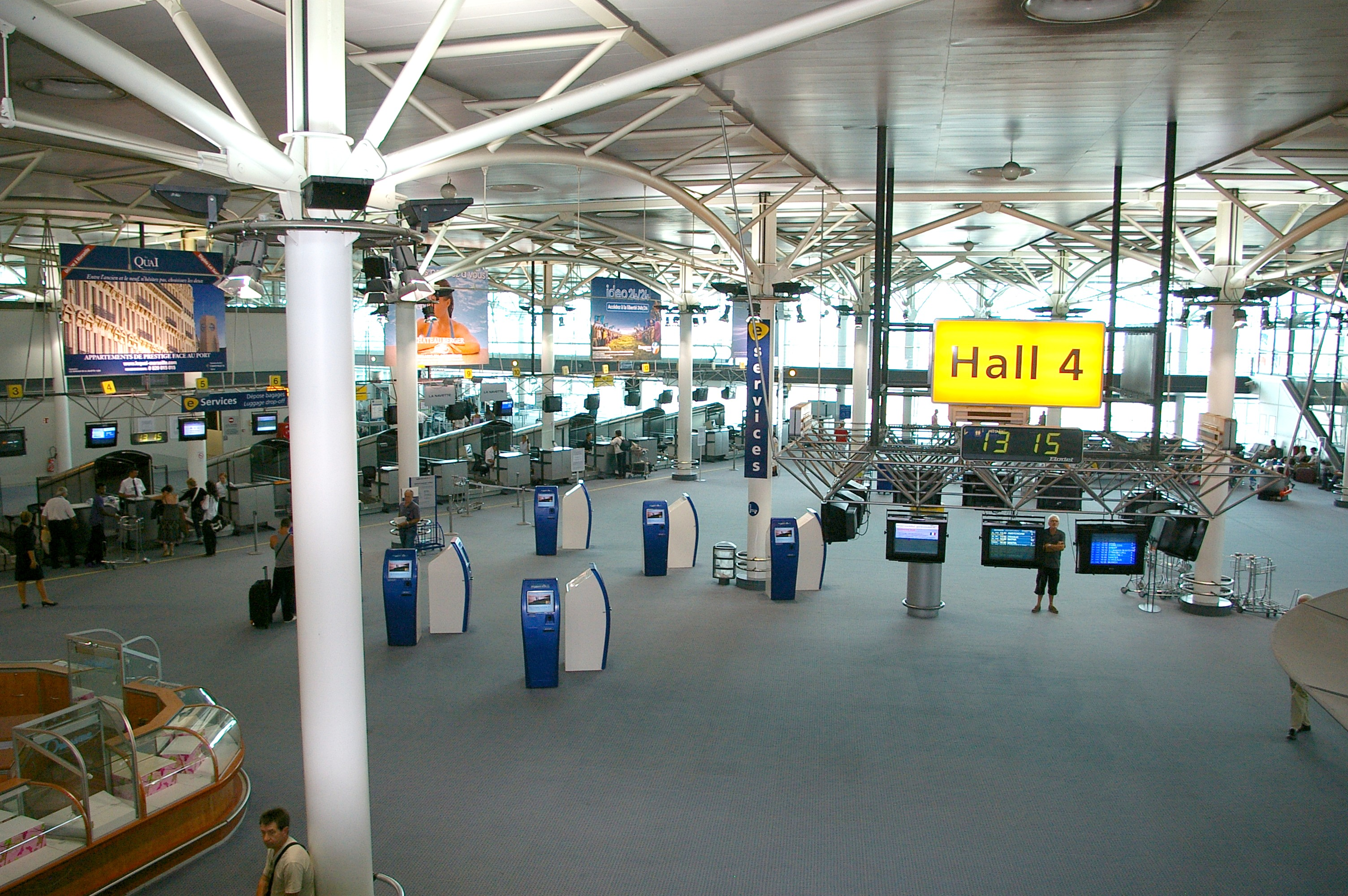 Le hall 4 de l'aéroport Marseille-Provence